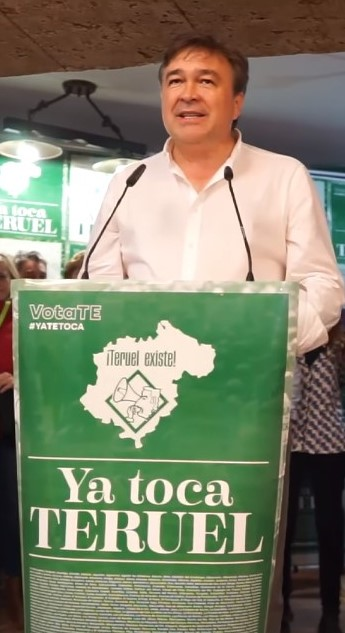 El arquitecto y diputado del Congreso de los Diputados, Tomás Guitarte en su comparecencia durante la noche electoral del 10 de noviembre de 2019, tras que Teruel Existe fuera la primera fuerza política de la Provincia.